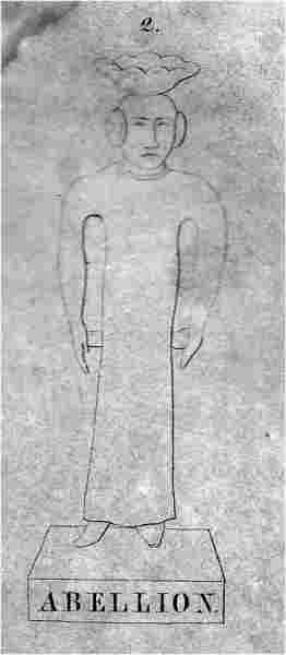 Abellion, Gott der Gallier.